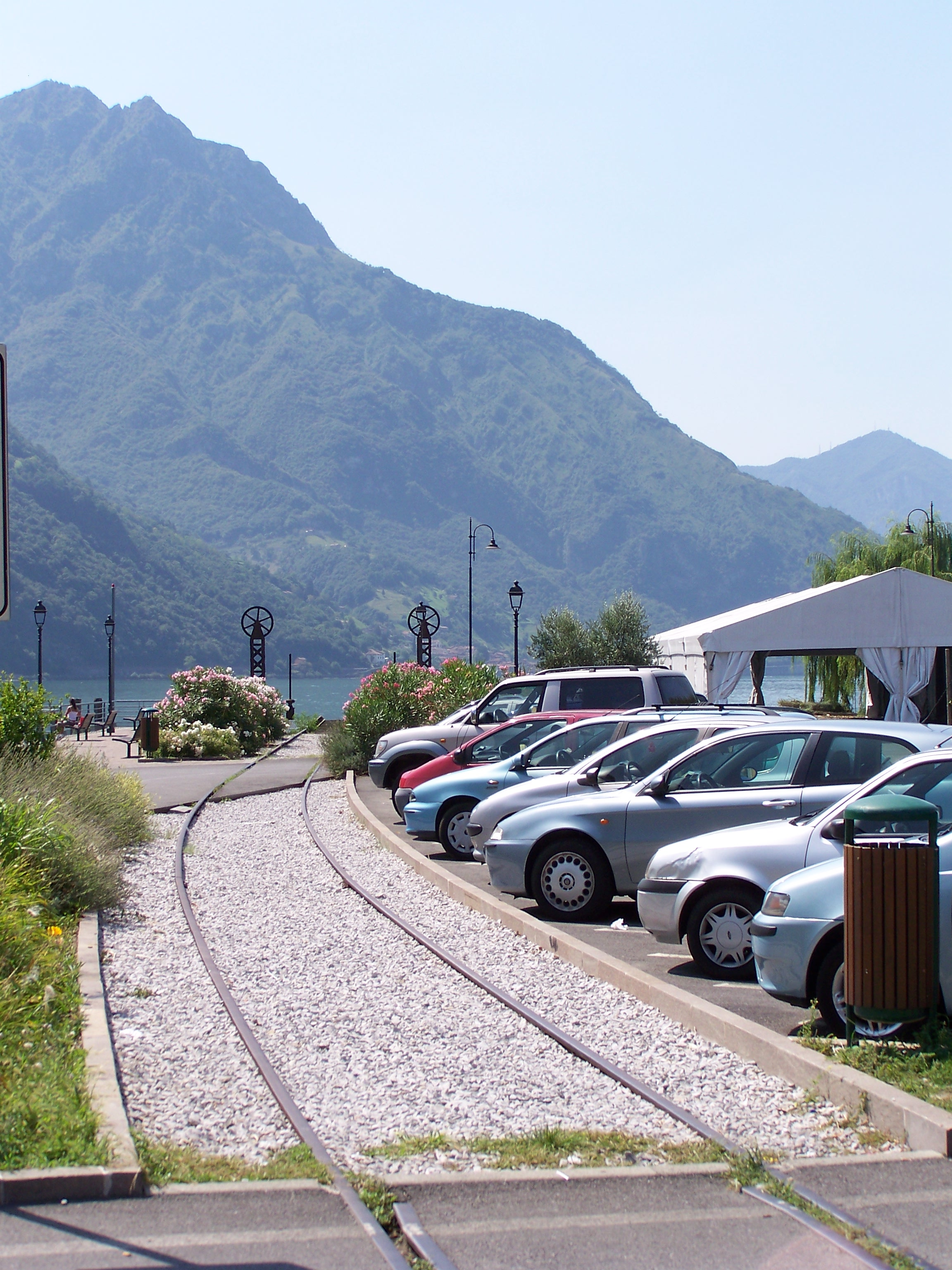 Il breve raccordo tra l'imbarcadero e e la stazione di Pisogne della ferrovia Brescia-iseo-Edolo